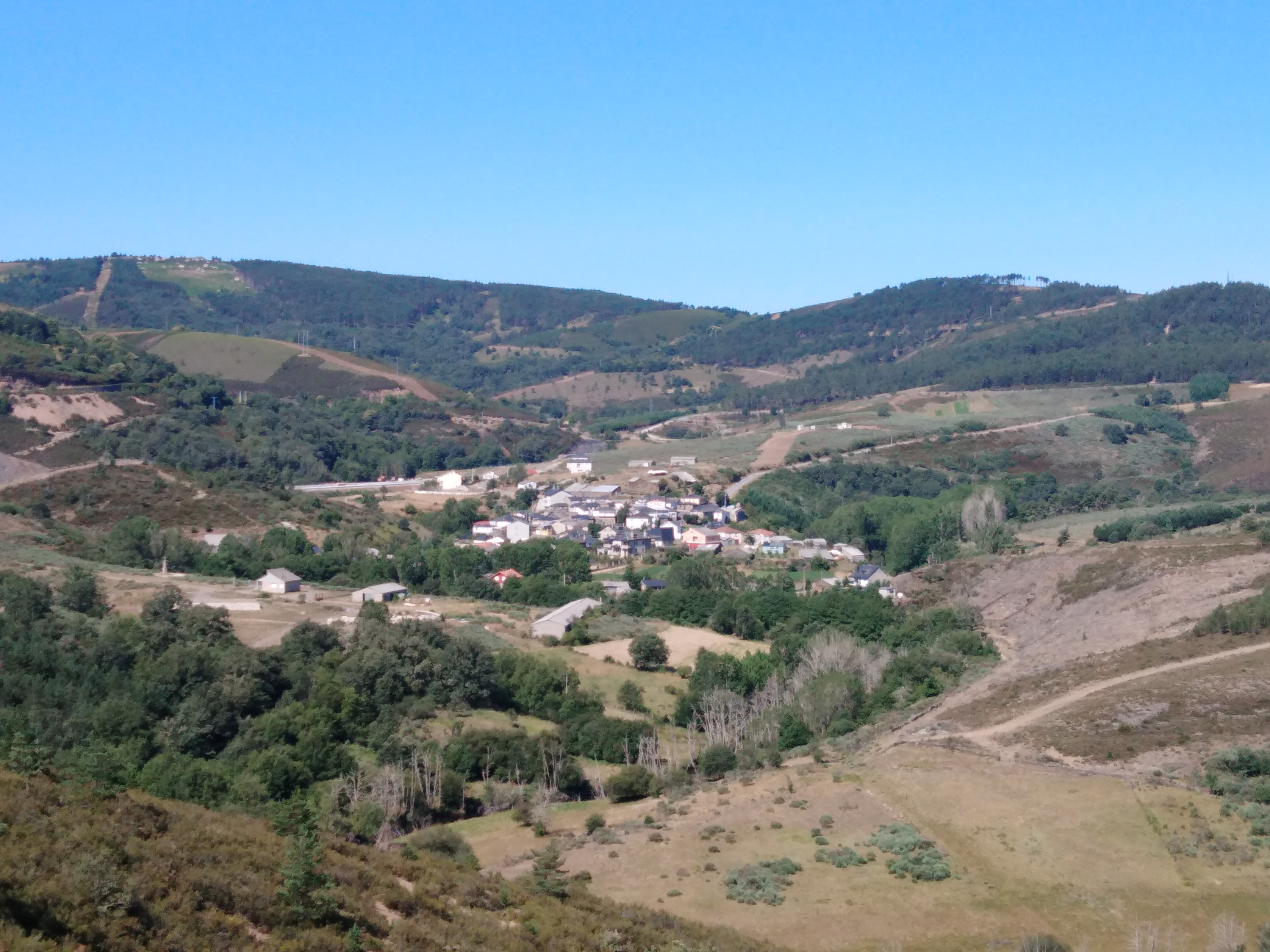 Vista xeral da aldea de Campobecerros (Castrelo do Val)